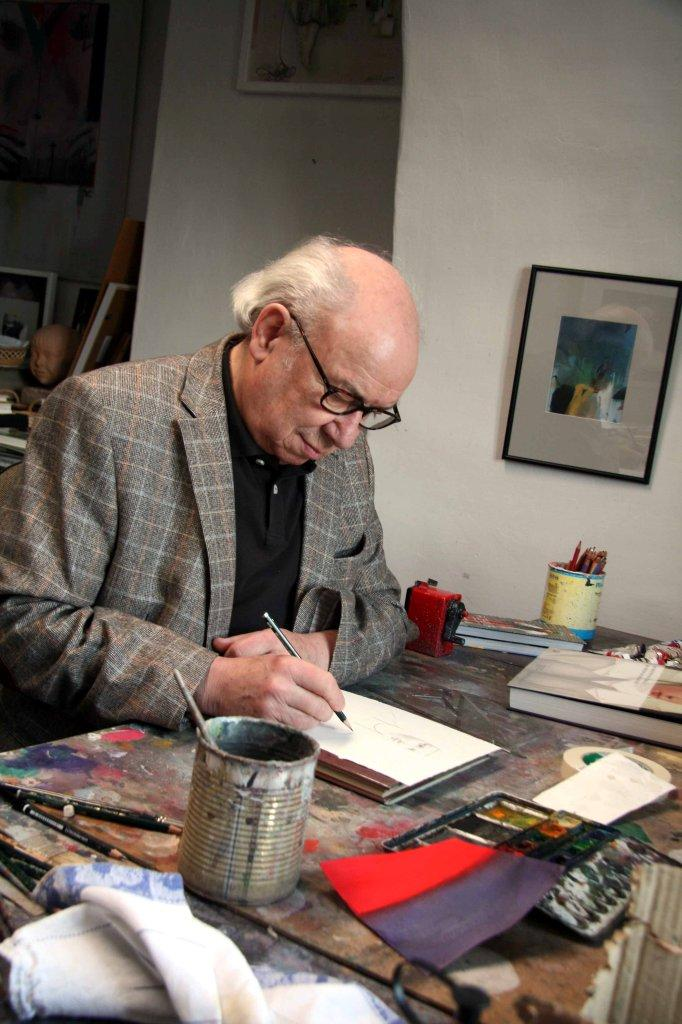 Willy Reichert, Portrait des Künstlers